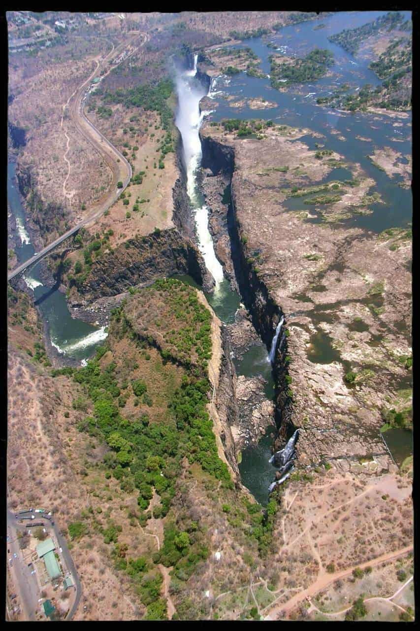 Le Victoria Falls viste dall'elicottero nella stagione secca